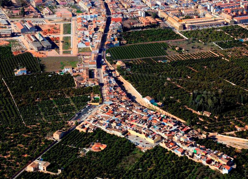 Vista aeria barrio Les Barraques de Carcaixent